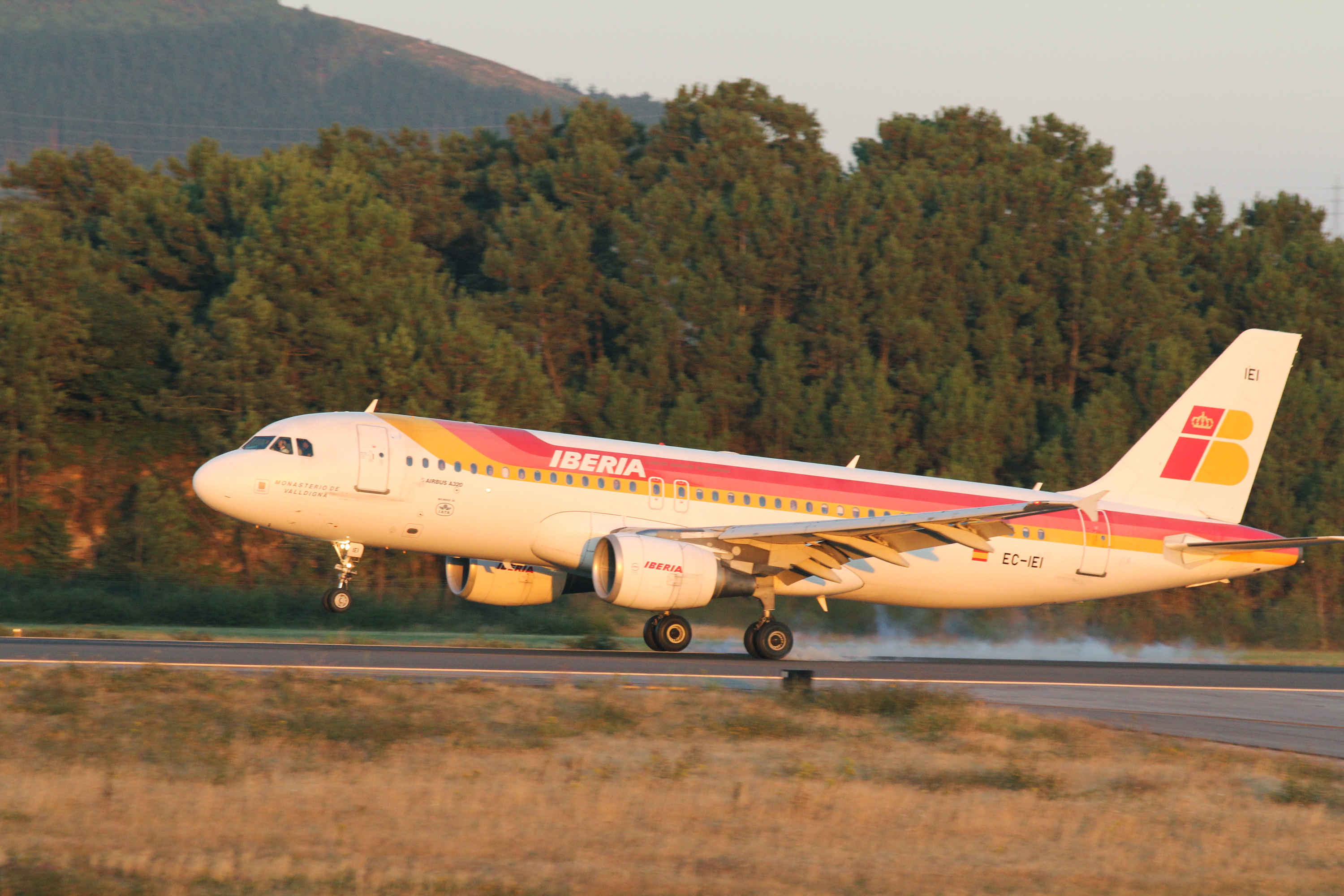 Airbus A320-214 "Monasterio de Valladigna" (EC-IEI, cn1694) de Iberia, aterrizando en el Aeropuerto de Peinador, en Vigo (Galicia, España). Landing at Peinador Airbus A320-214 "Monasterio de Valladigna" (EC-IEI, cn1694) of Iberia landing at airport Peinador in Vigo (Galicia, Spain).